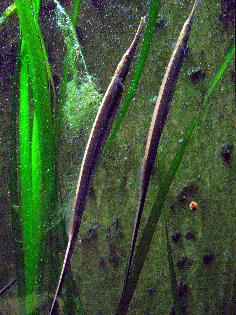 Große Süßwasserseenadel